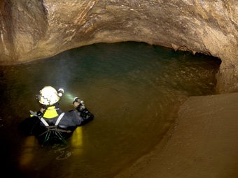 Apraiz (Busturia), 2009-V-9. ADES Espeleologia Elkarteko urpekariak (Ricardo Gutierrez eta Antonio Garcia) kobako azken sifoia esploratzen. Handik egun gutxira Goikoetxeko koba bertatik aurkituko zuten.